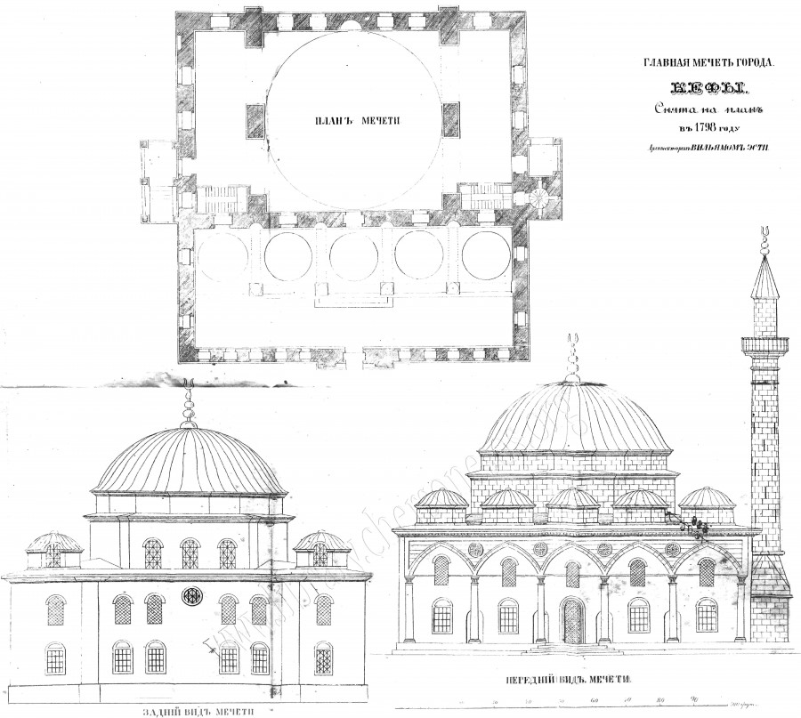 План главной мечети города Кефы, снят в 1798 году архитектором Вильямом Эсти (William Hastie). Опубликован в 8 томе Записок Одесского общества истории и древностей (1872 г.)